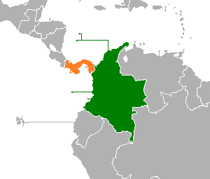 Localización de Colombia y Panamá.